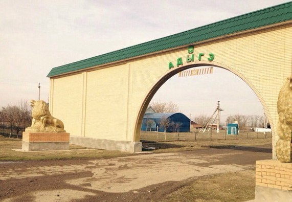 Въезд в село Серноводское Адыгэбзэ: Серноводскэ дэлъэдапIэ